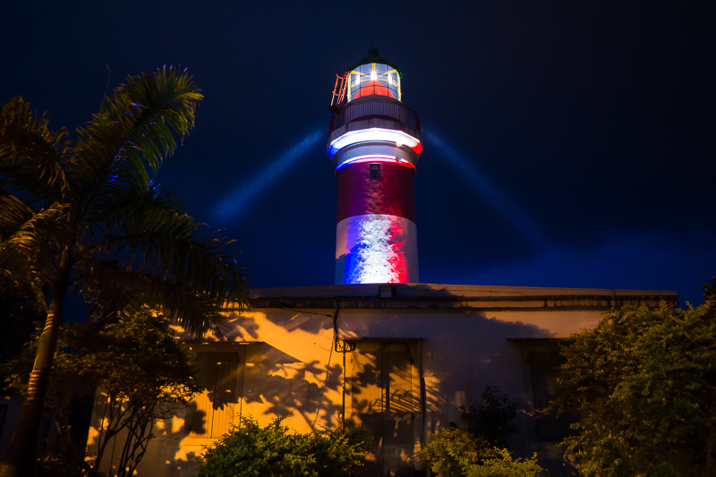 Oeuvre de Patrick Singaïny livrée le 18 décembre 2013 - Phare de Bel-air - Sainte-Suzanne de l'Île de La Réunion